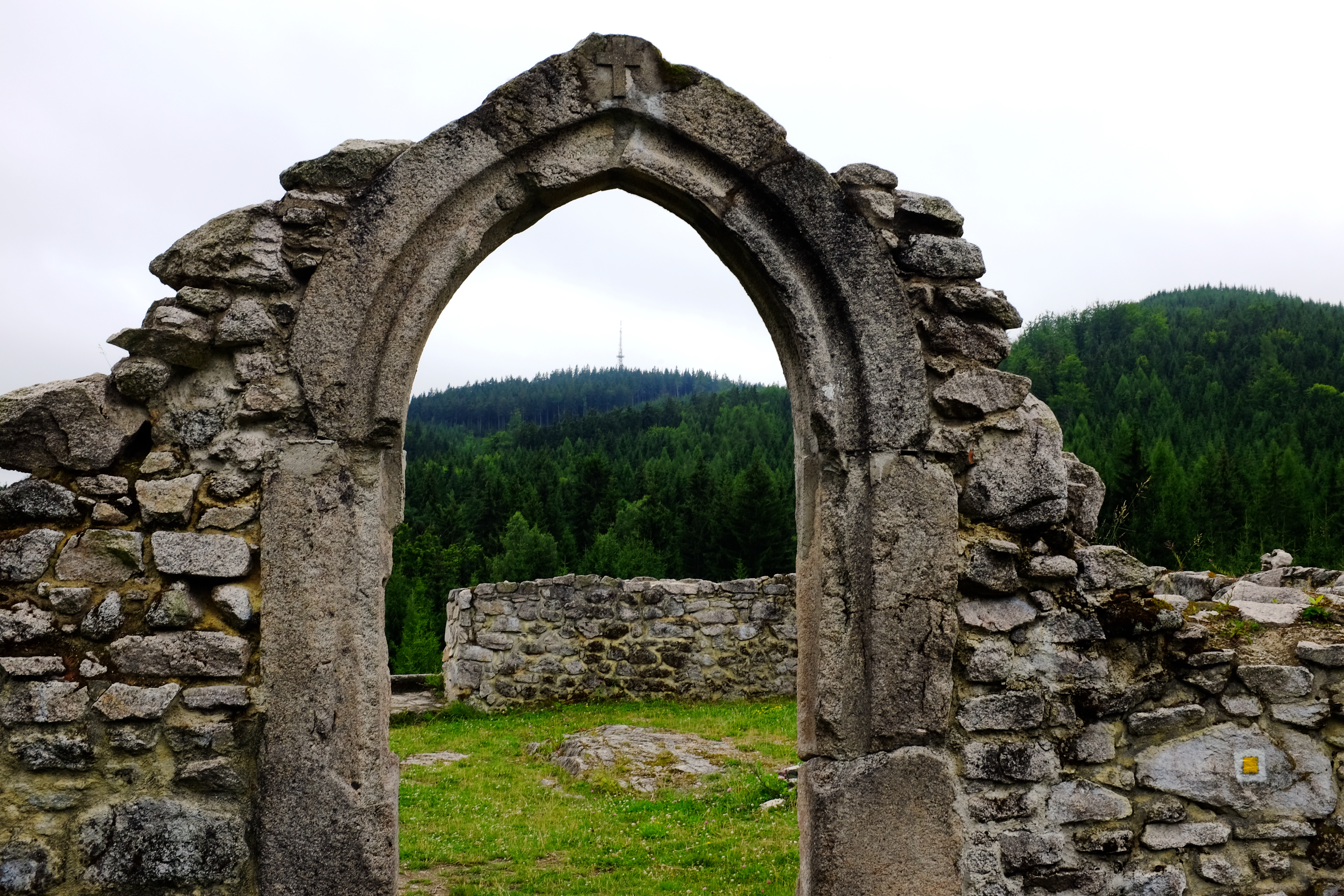 Hrušková, ruina kostela sv. Mikuláše, okres Sokolov